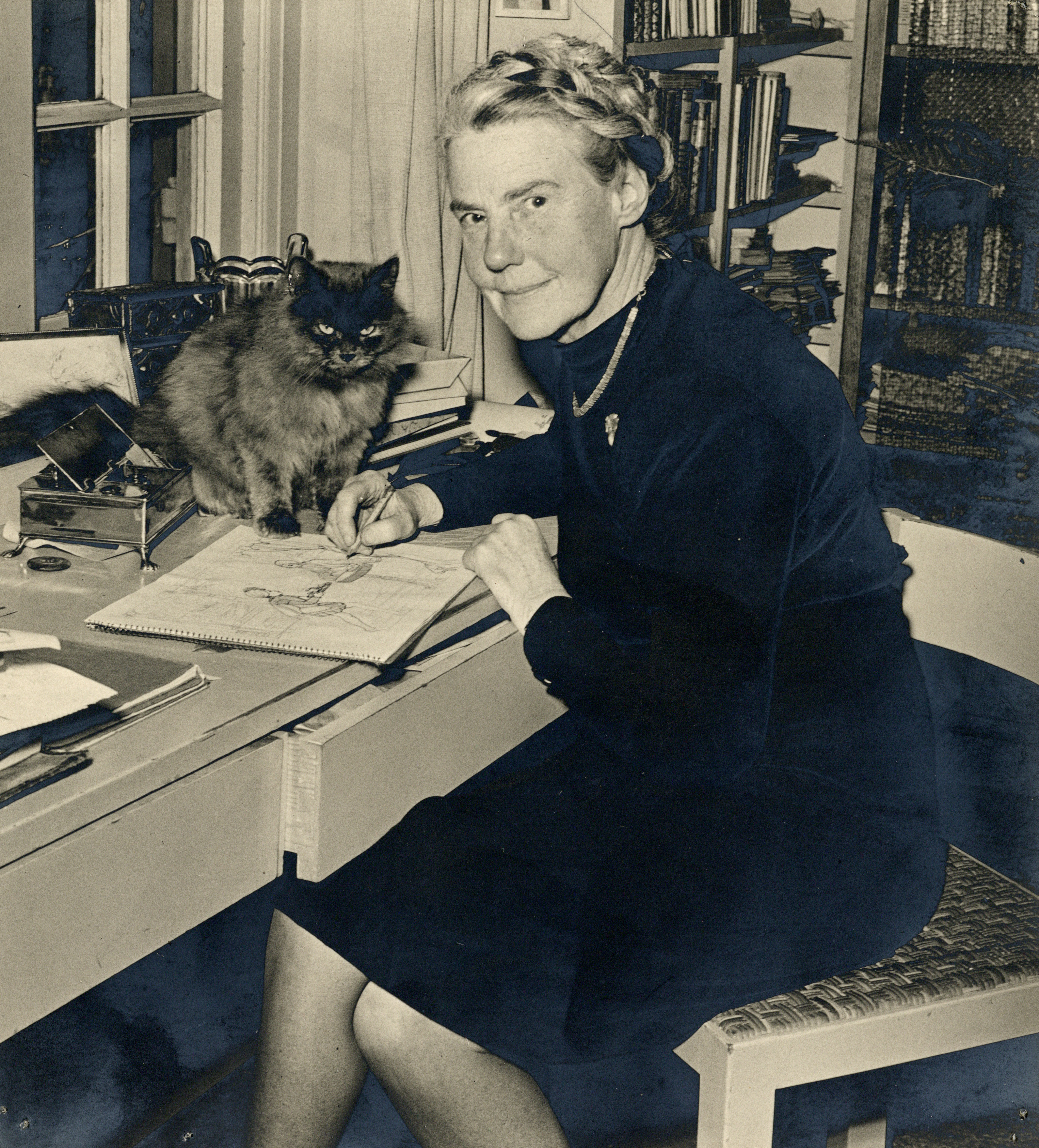 Portret van tekenares Rie Cramer met een van haar Angora poezen in haar woning in Laren (N.H.).. Foto b x h 15 x 17 cm; digitale reproductie X 115496 Auteursrechthouder Het Utrechts Archief; catalogusnummer 405990 Opmerking: Zie ook het Utrechtsch Nieuwsblad, woensdag 22 oktober 1947, blz. 2: "Poezen en bloemen / Rie Cramers grote liefde / Méér dan de kinderen waarvoor en waarover ze tekent en schrijft".